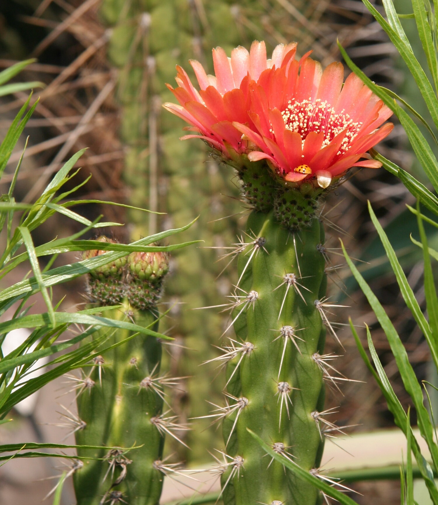 Corryocactus melanotrichus im Botanischen Garten Dresden